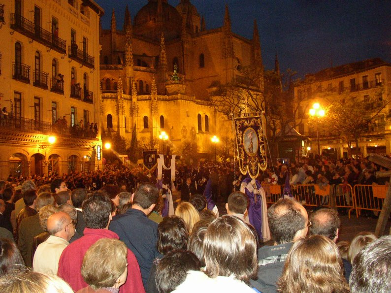 Segovia. (Castilla-León. España) Semana Santa. Fotografía realizada el 18 abril de 2003 por el autor.User:Pelayo2